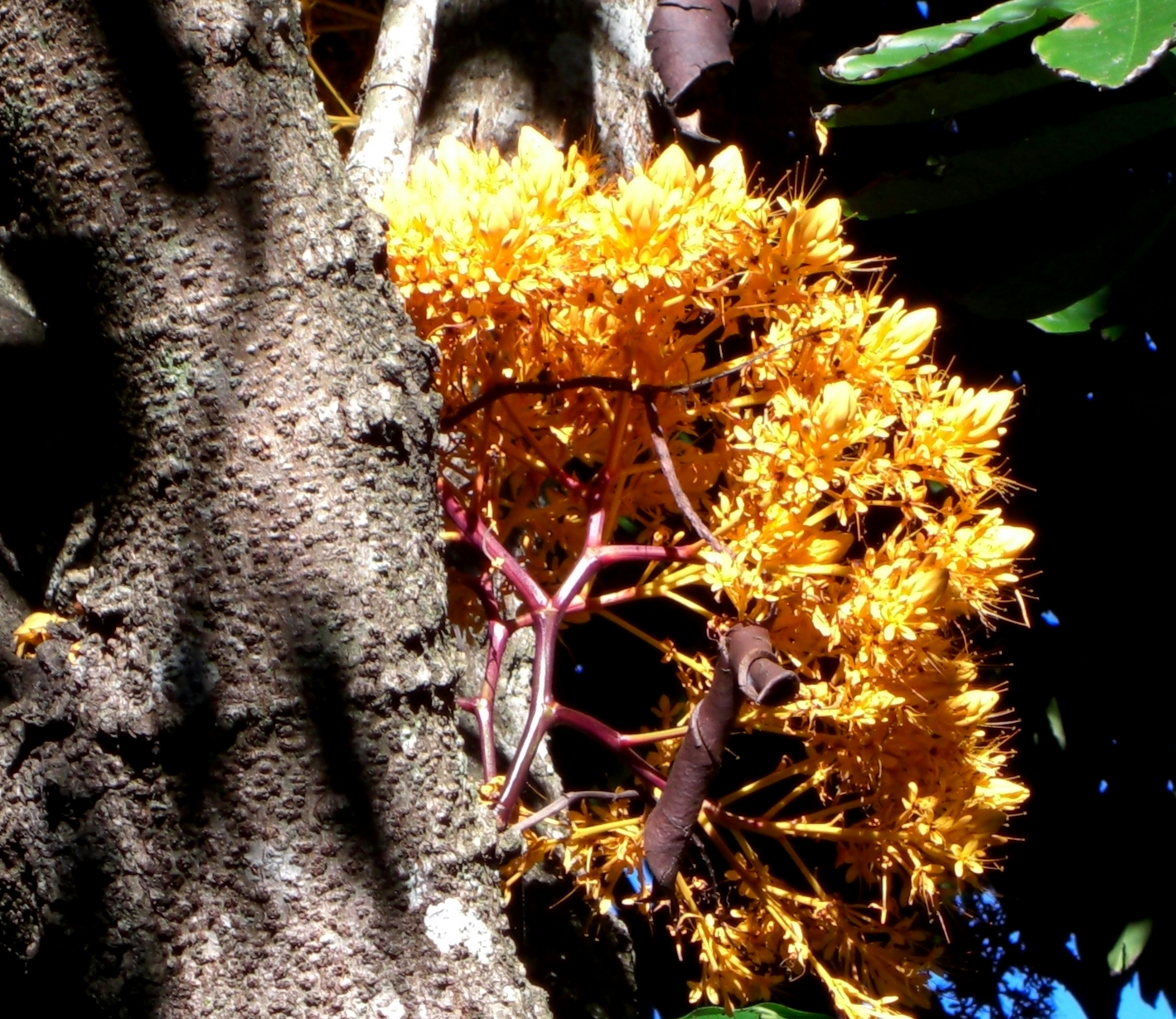 Plante du jardin botanique de Cairns, Queensland.